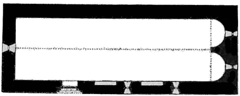 Plan de l'église de Montbolo, par Jean-Auguste Brutails